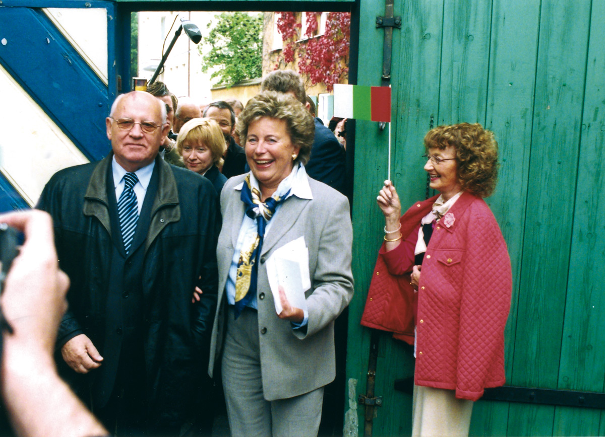 Die Vorsitzende des Fürstlich und Gräflich Fuggerschen Familienseniorats, Maria Elisabeth Gräfin Thun-Fugger, mit Michail Gorbatschow bei dessen Besuch in der Fuggerei im Jahr 2005.